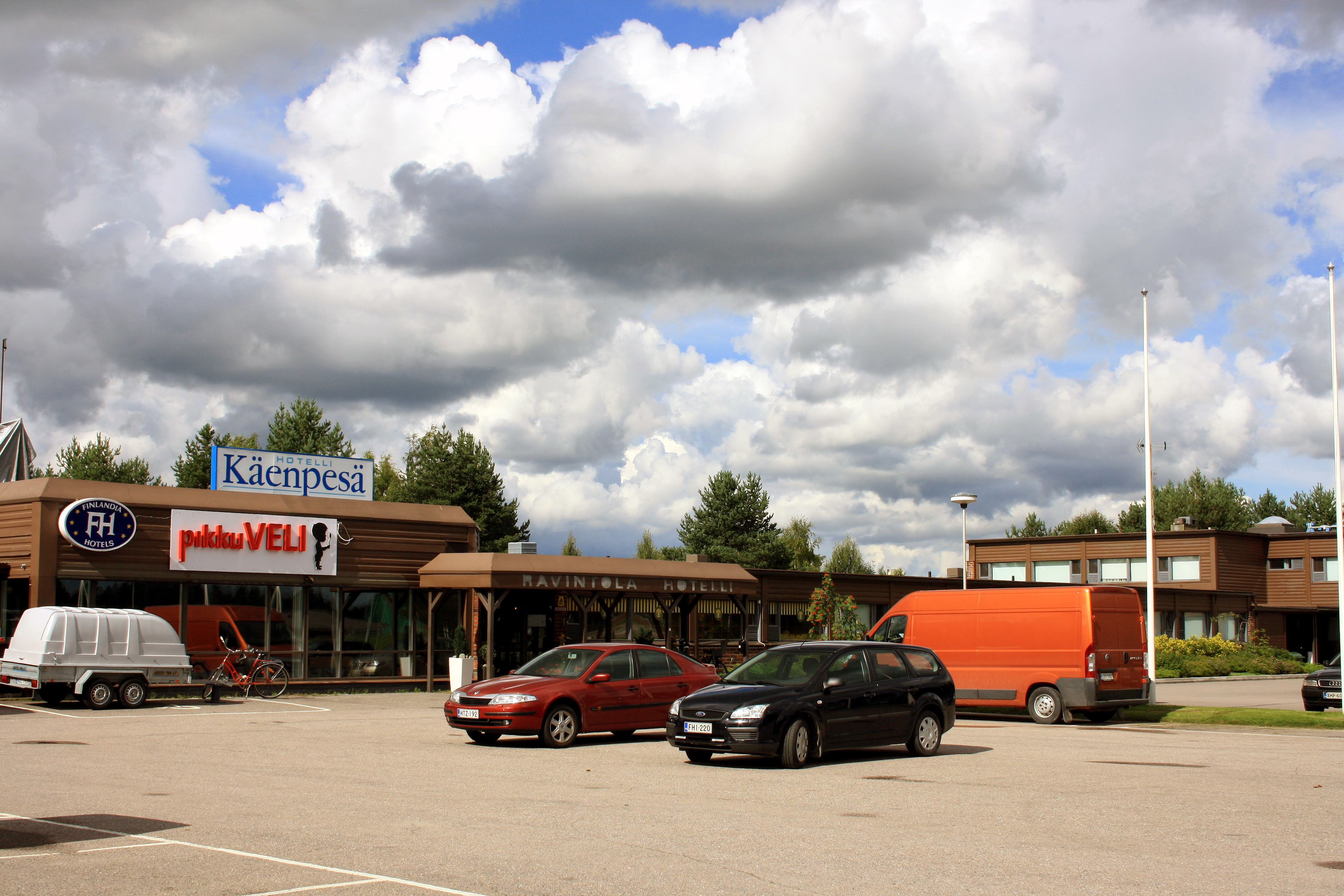 Hotelli Käenpesä Ylivieskassa, Suomessa.